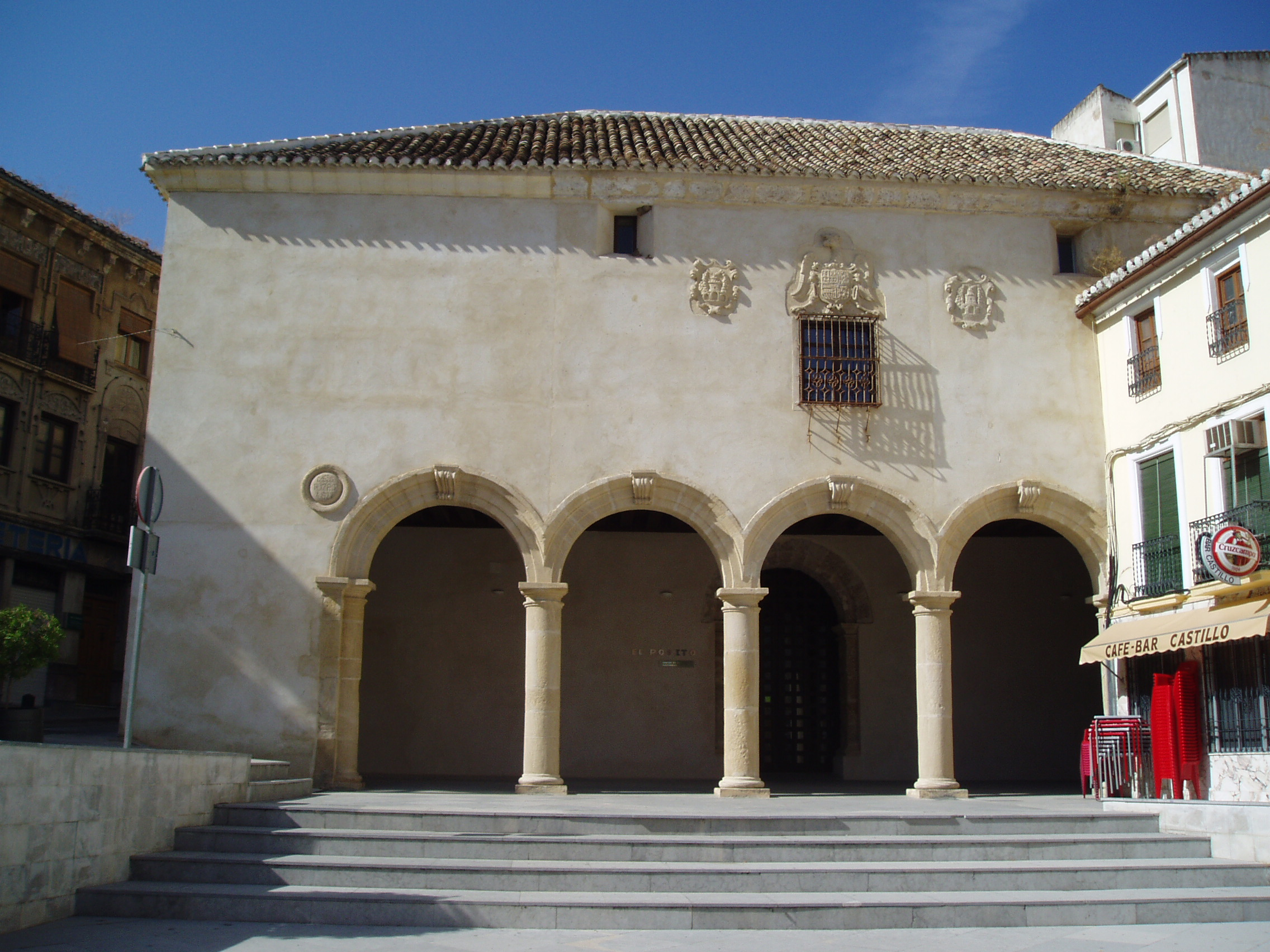 Pósito de Loja, Granada. En la conocida Plaza de Abajo o de Joaquín Costa, se construyó a finales del siglo XVI el pósito o granero público. Se cuenta que fueron varios vecinos los que en 1535 solicitaron al Cabildo su construcción. Así Juan de Maeda realizaría su traza y condiciones del pósito aunque más tarde se llevarían a cabo dos ampliaciones que quedaron patentes en sendos medallones en su portada aludiendo al año de realización de las mismas (1650 y 1780) entre la heráldica real de Felipe II.